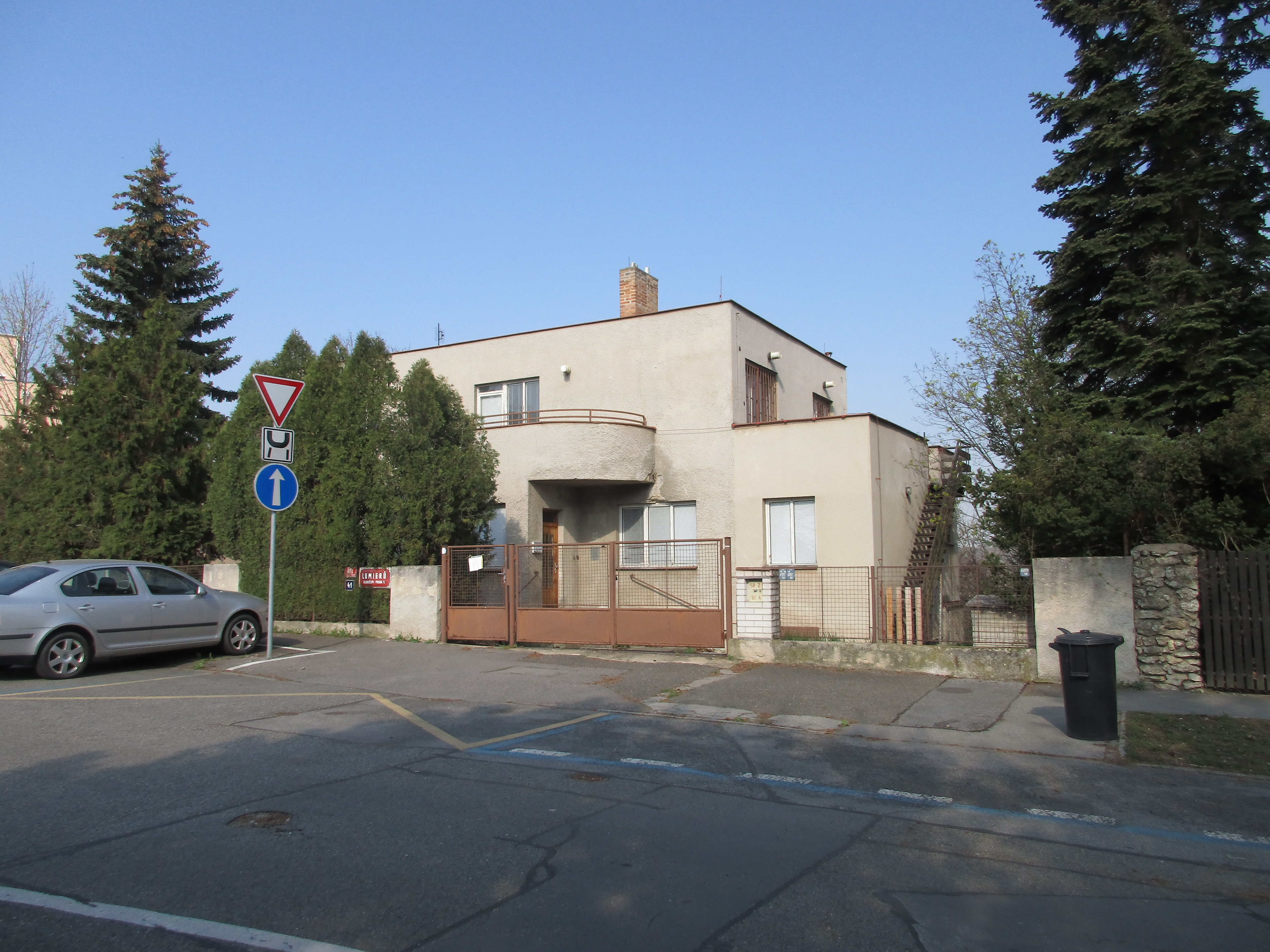 Lumiérů 181/41, Praha 5-Hlubočepy. Výstavní vila č. 2.